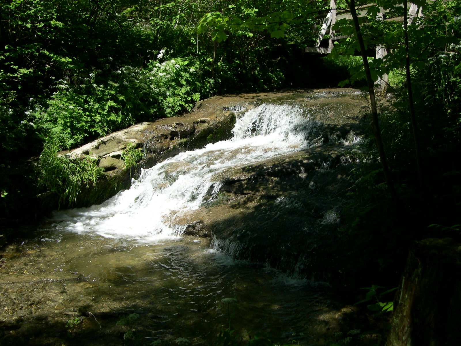 Chute d'eau sur le cours supérieur du Flon.